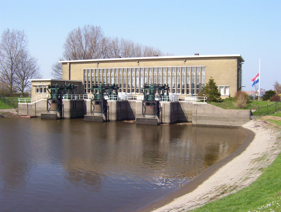 Het Mr. P.A. Pijnacker Hordijk gemaal Eigen foto, gebruik vrij. De vlag hangt halfstok vanwege het overlijden van Koningin Juliana